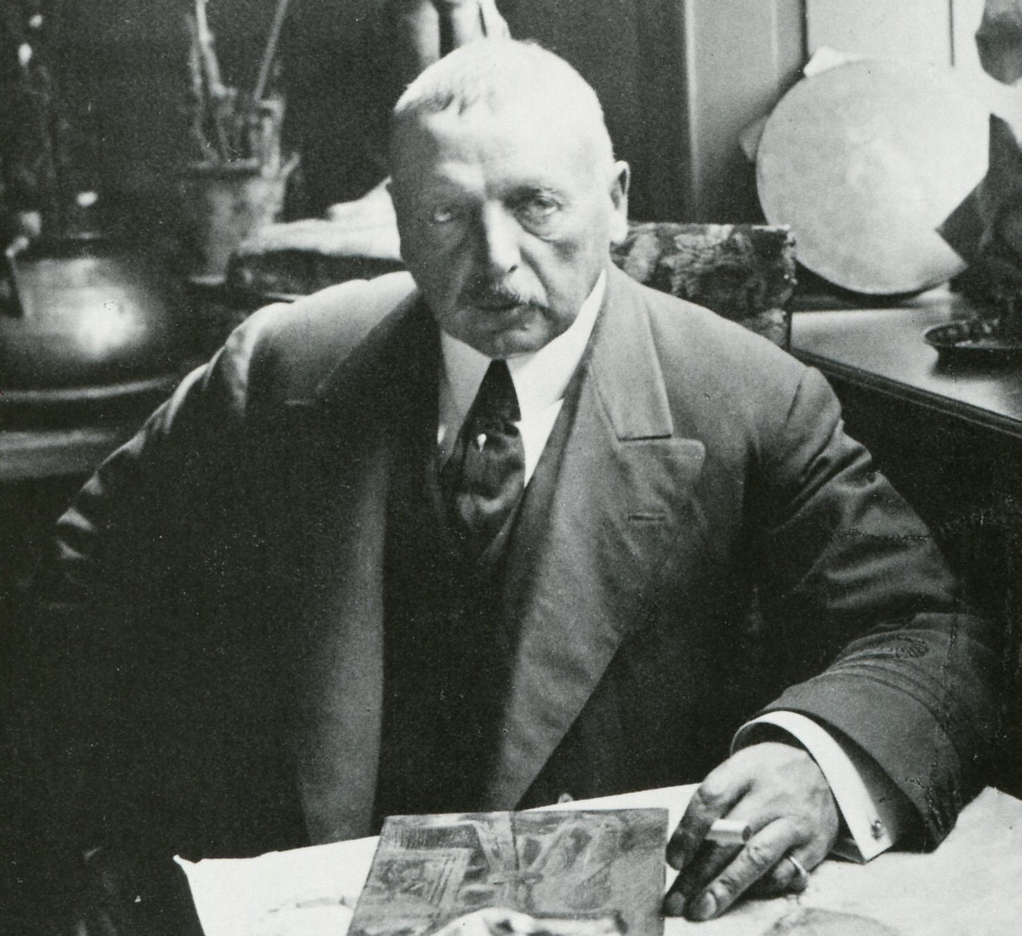 Anders Zorn